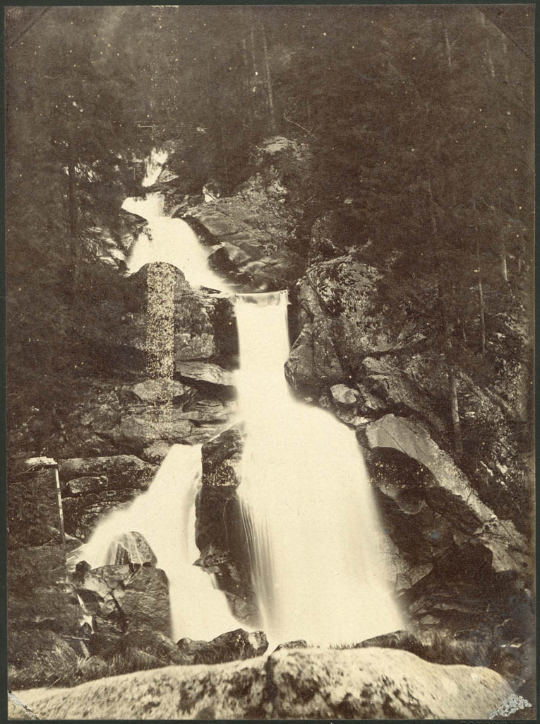 Triberg Waterfall, Black Forest, Baden-Württemberg, Germany.